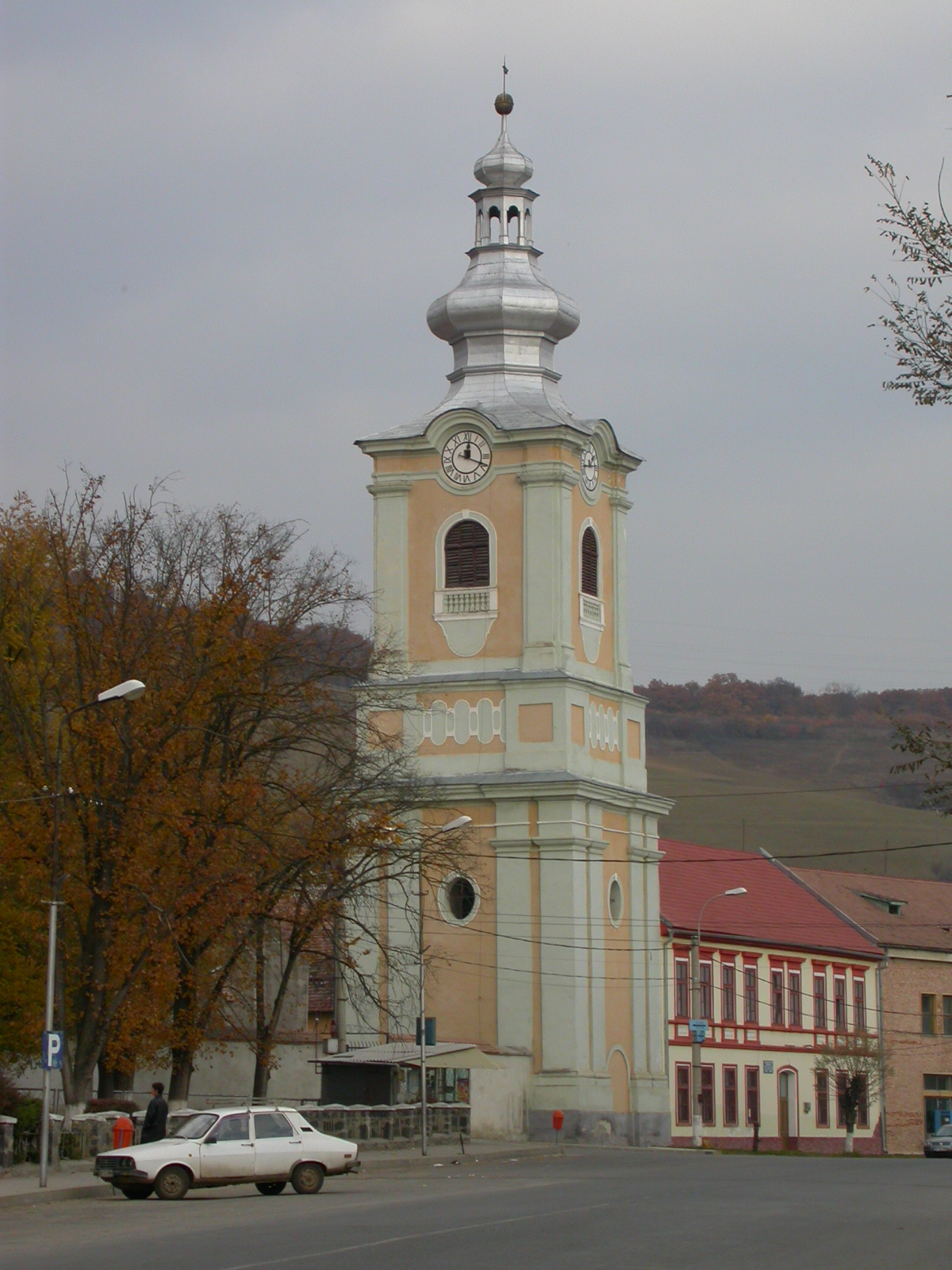 Ansamblul bisericii evanghelice, sec. XV - XVIII 02